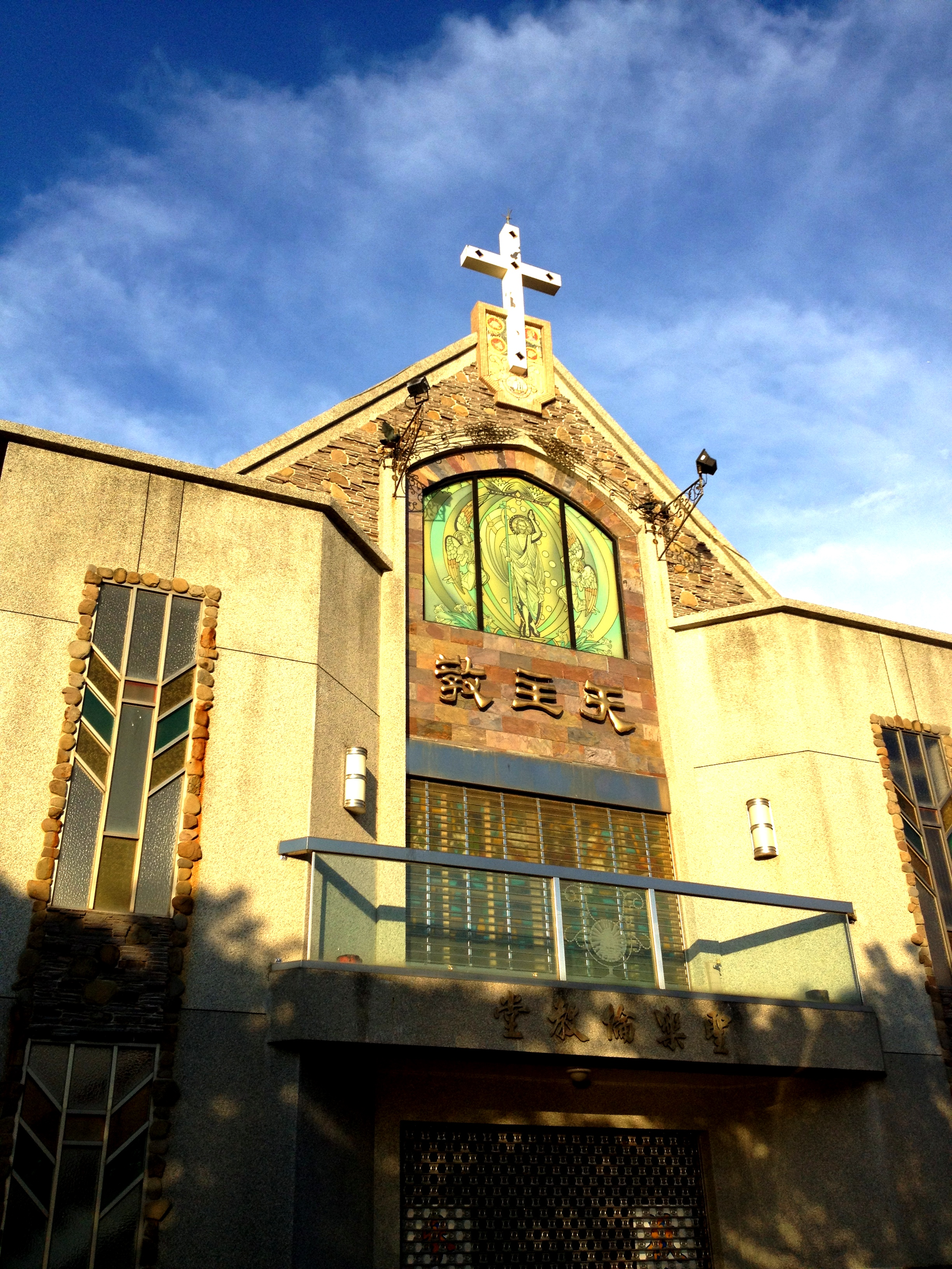 有附設幼稚園